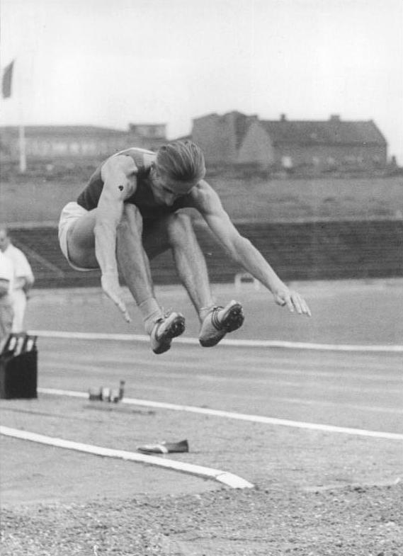 Karl Thierfeldner Zentralbild Zimmermann 14.7.1957 3. Tag Deutsche Leichtathletikmeisterschaften 1957 im Walter-Ulbricht-Stadion, Berlin. UBz: Karl Thierfelder vom SC Dynamo Berlin beim Dreisprung.